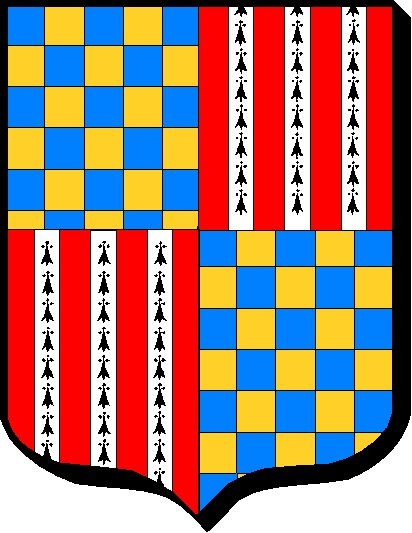 Blason Famille Achard, seigneurs de Pommiers de Vérac (Gironde), Thiou (Archiac), Théon (Cozes). 1489-1698